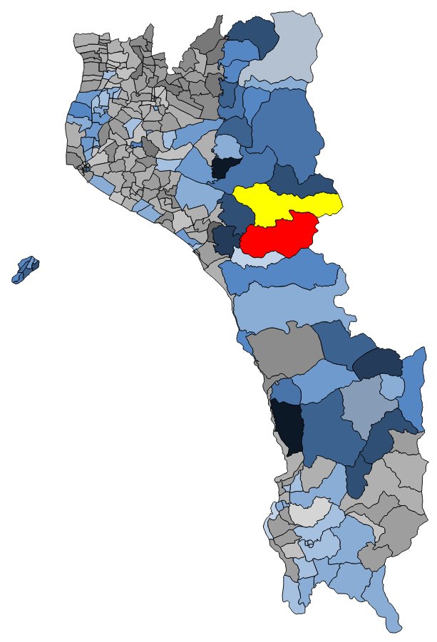 中文（台灣）: 顏色對照表 屏東縣春日鄉力里村 蘇震清、周嘉琪、張怡各拿下2票，何麗莉1票 標示為黃色 屏東縣春日鄉士文村 蘇震清、張怡各拿下2票 標示為紅色